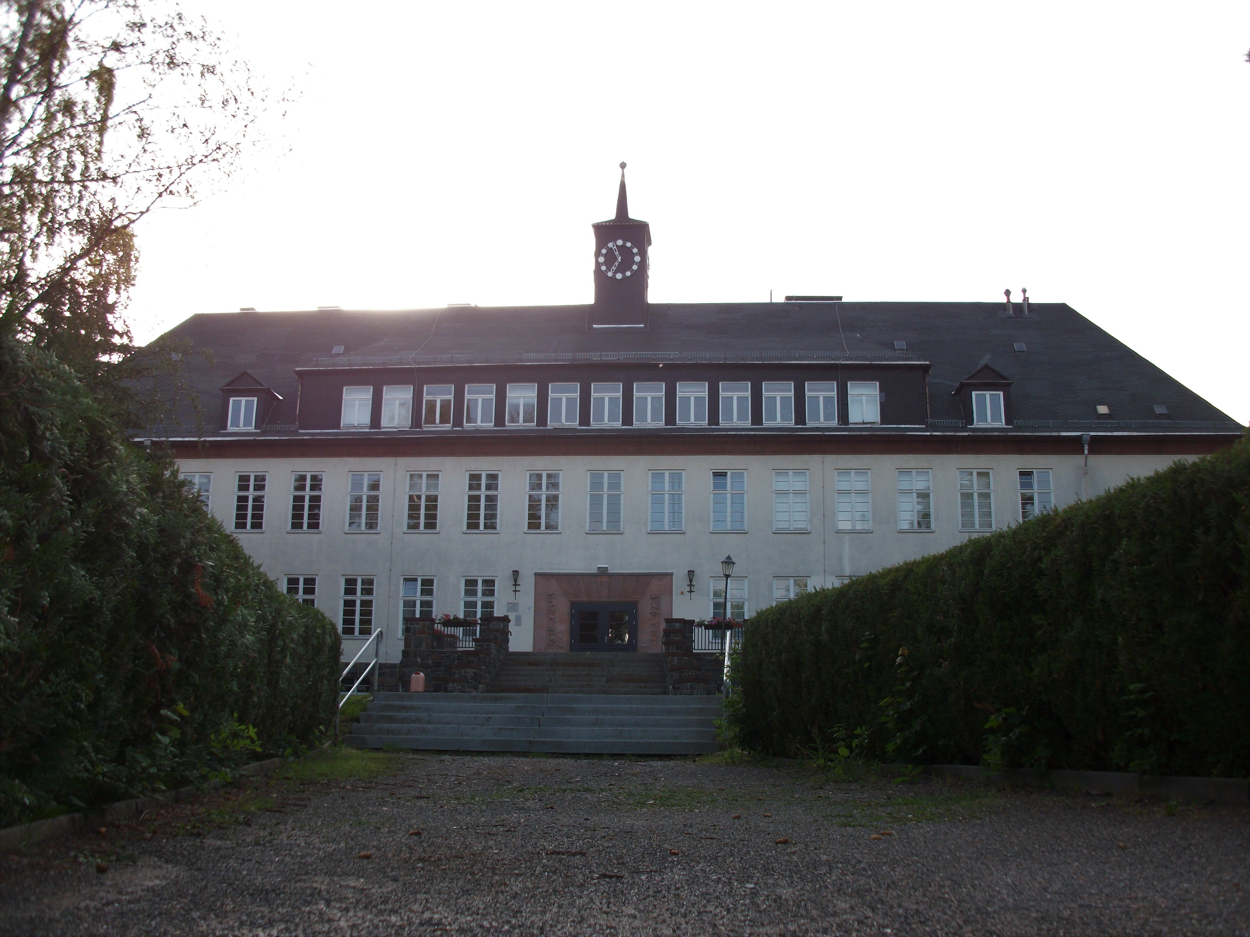 Oberschule Niederwiesa, Mühlenstraße 21 (Obere Schule)